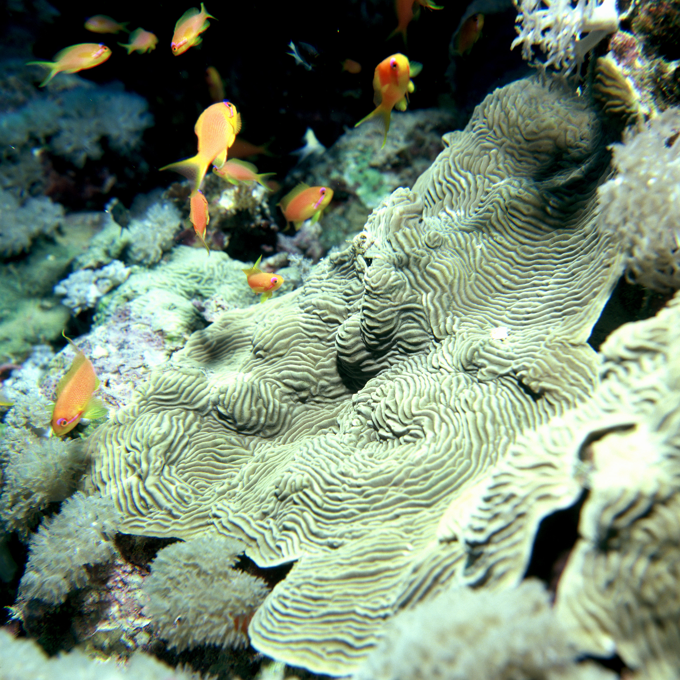 Leptoseis sp.